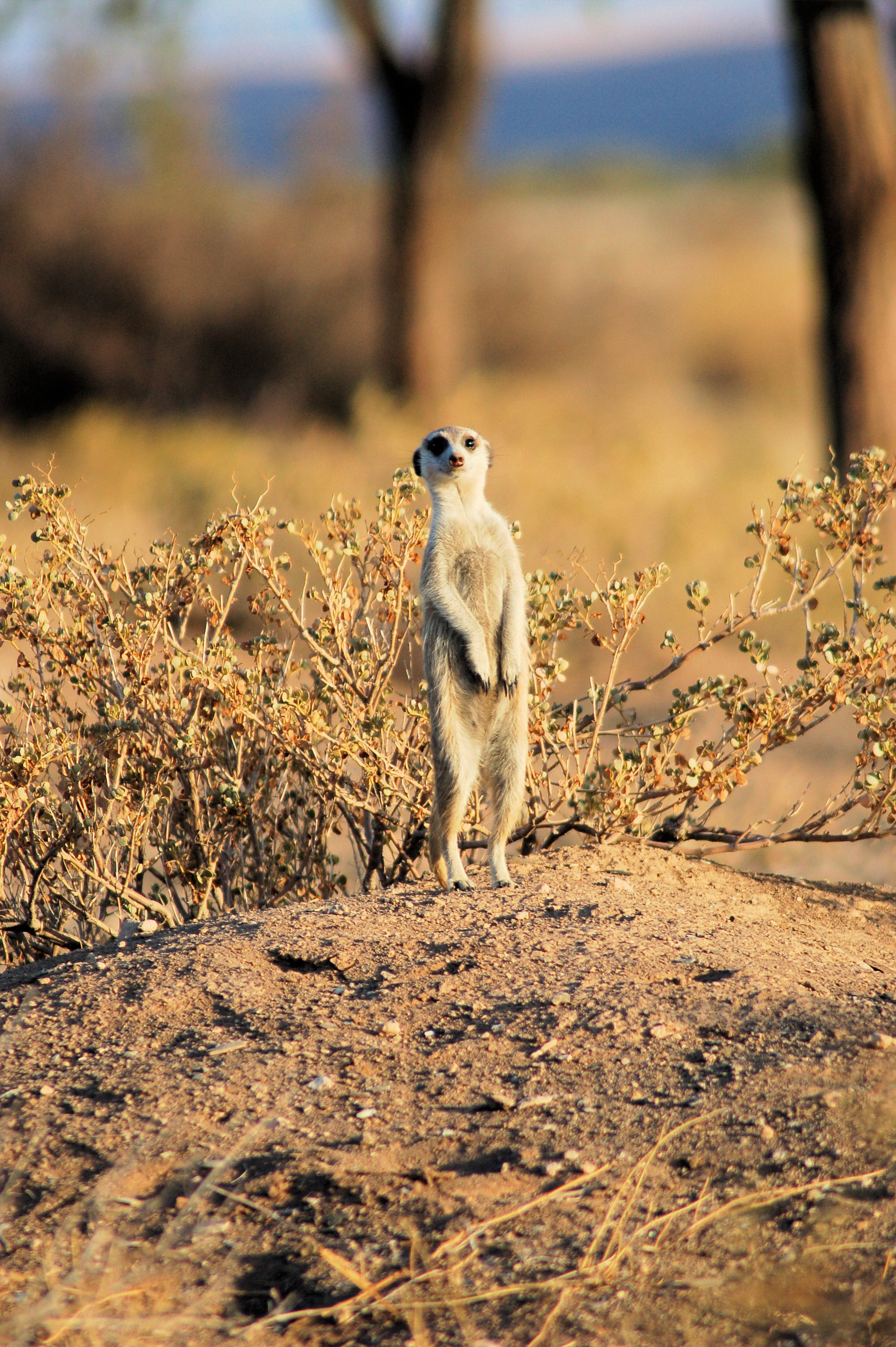 Suricate, Namibia